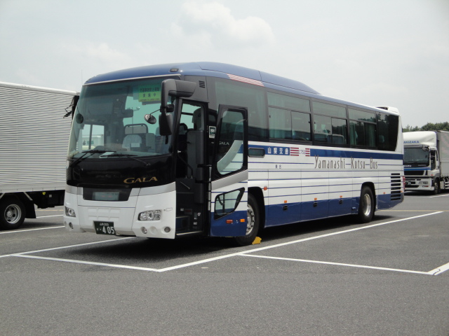 いすゞガーラ（PKG-RU1ESAJ）